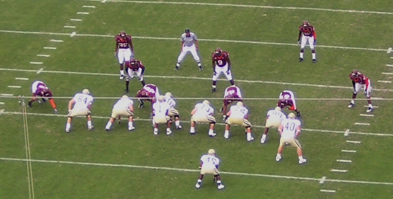 Reggie Ball under center for Georgia Tech against Virginia Tech